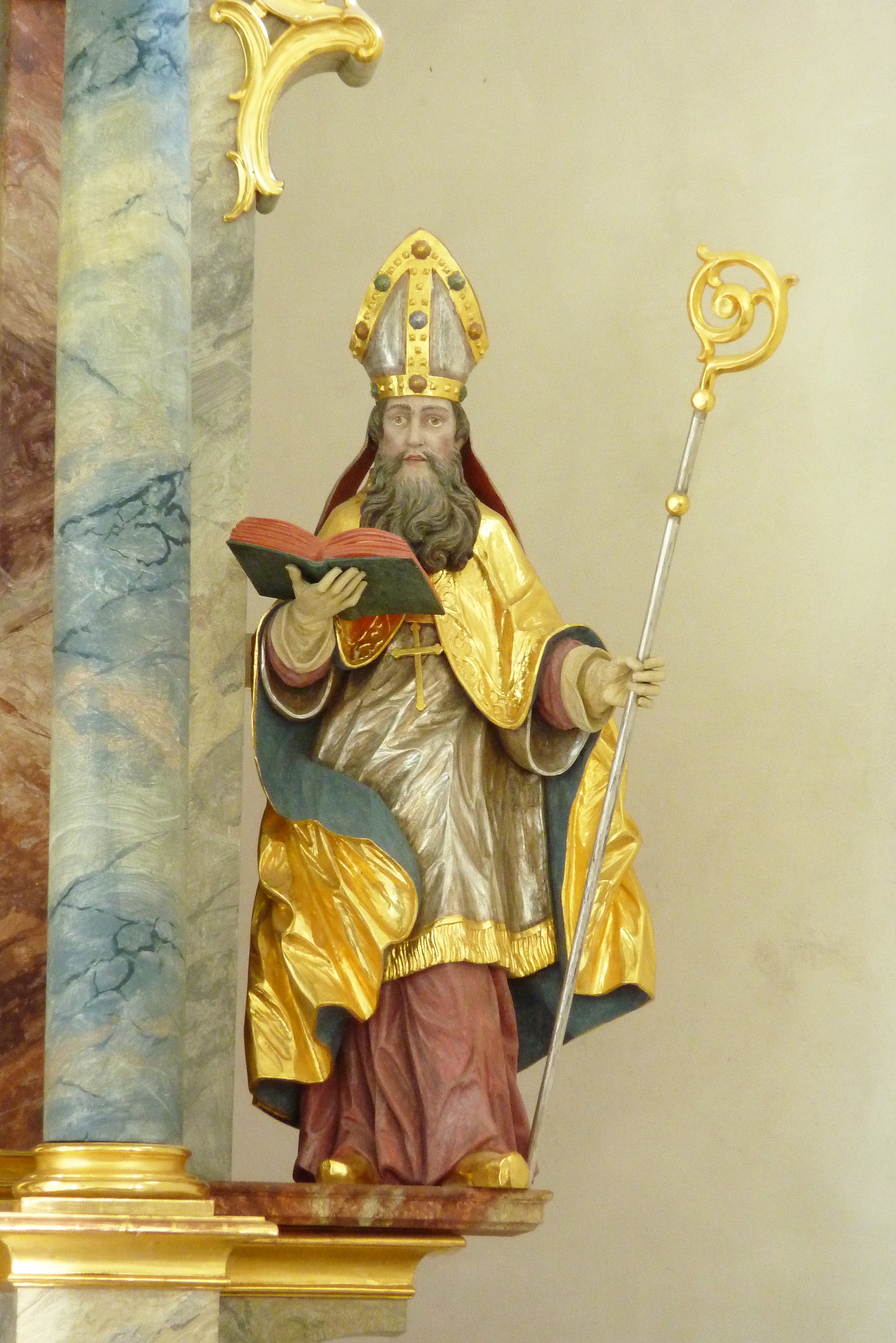 Katholische Kapelle St. Lorenz in Epfach (Denklingen) im Landkreis Landsberg am Lech (Bayern/Deutschland), heiliger Wikterp